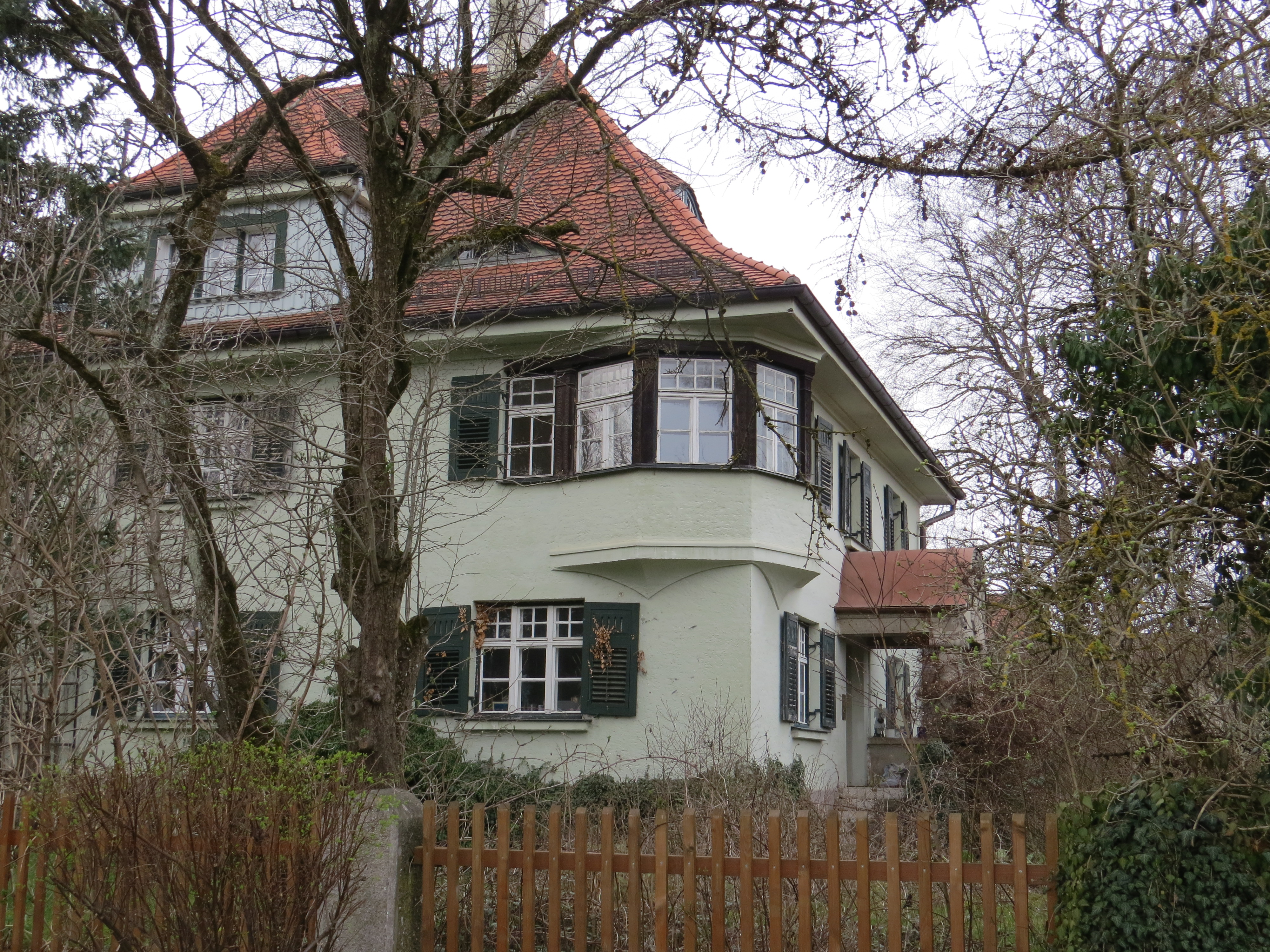 Bahnhofstr. 8 in Denklingen